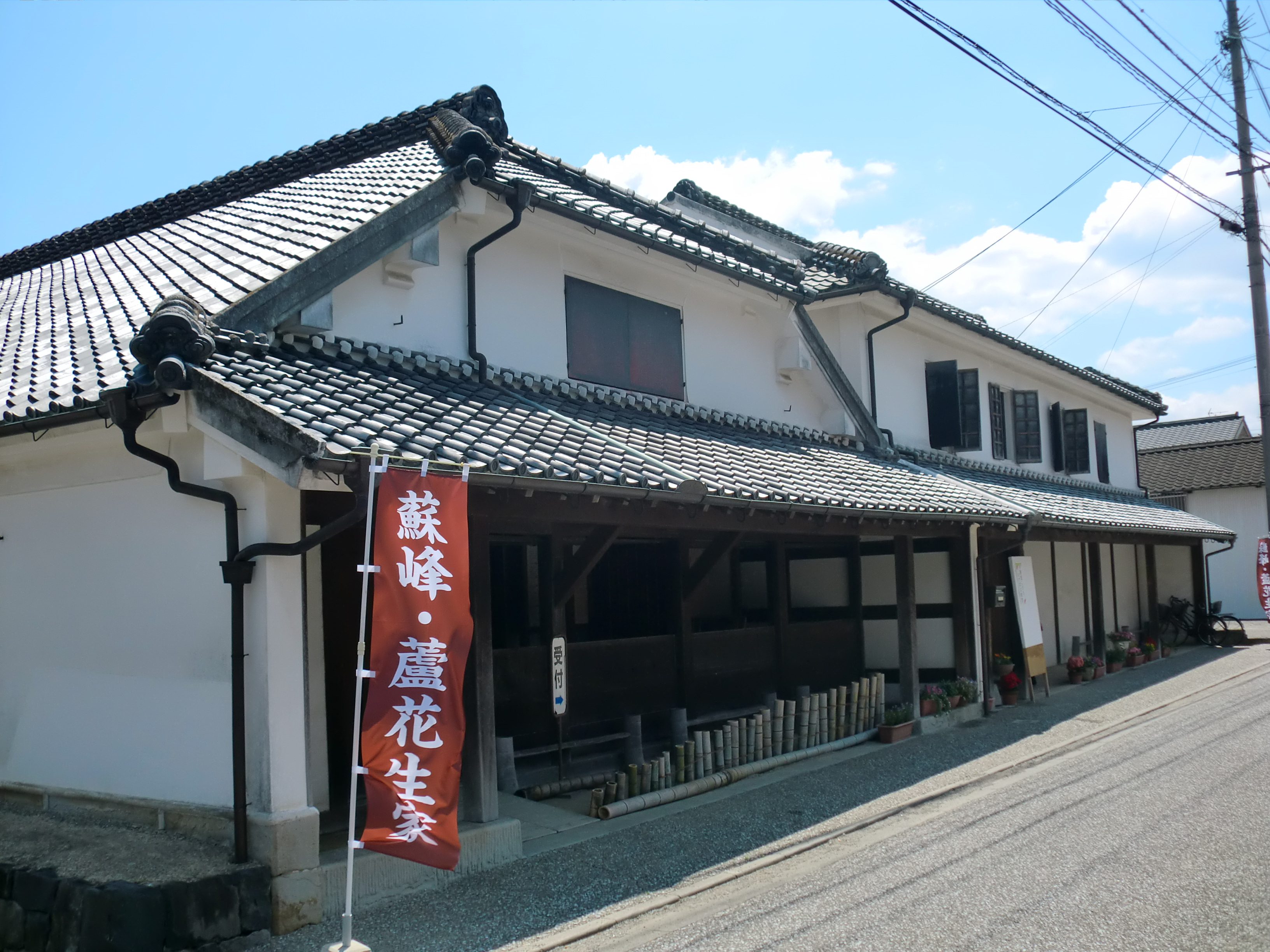 熊本県水俣市にある徳富蘇峰（とくとみそほう）、蘆花（ろか）の生家（復元）